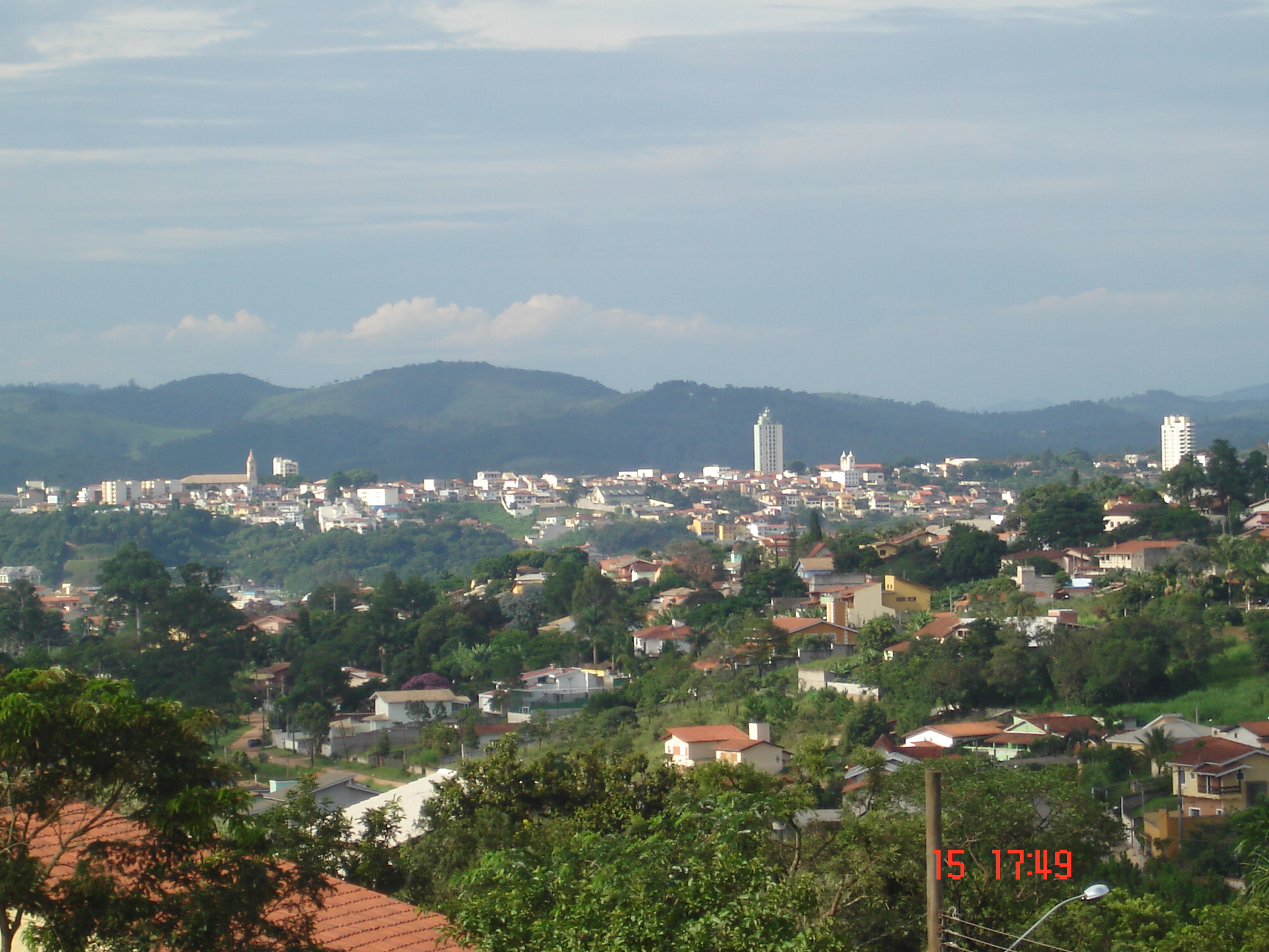 Vista do centro da cidade de Atibaia